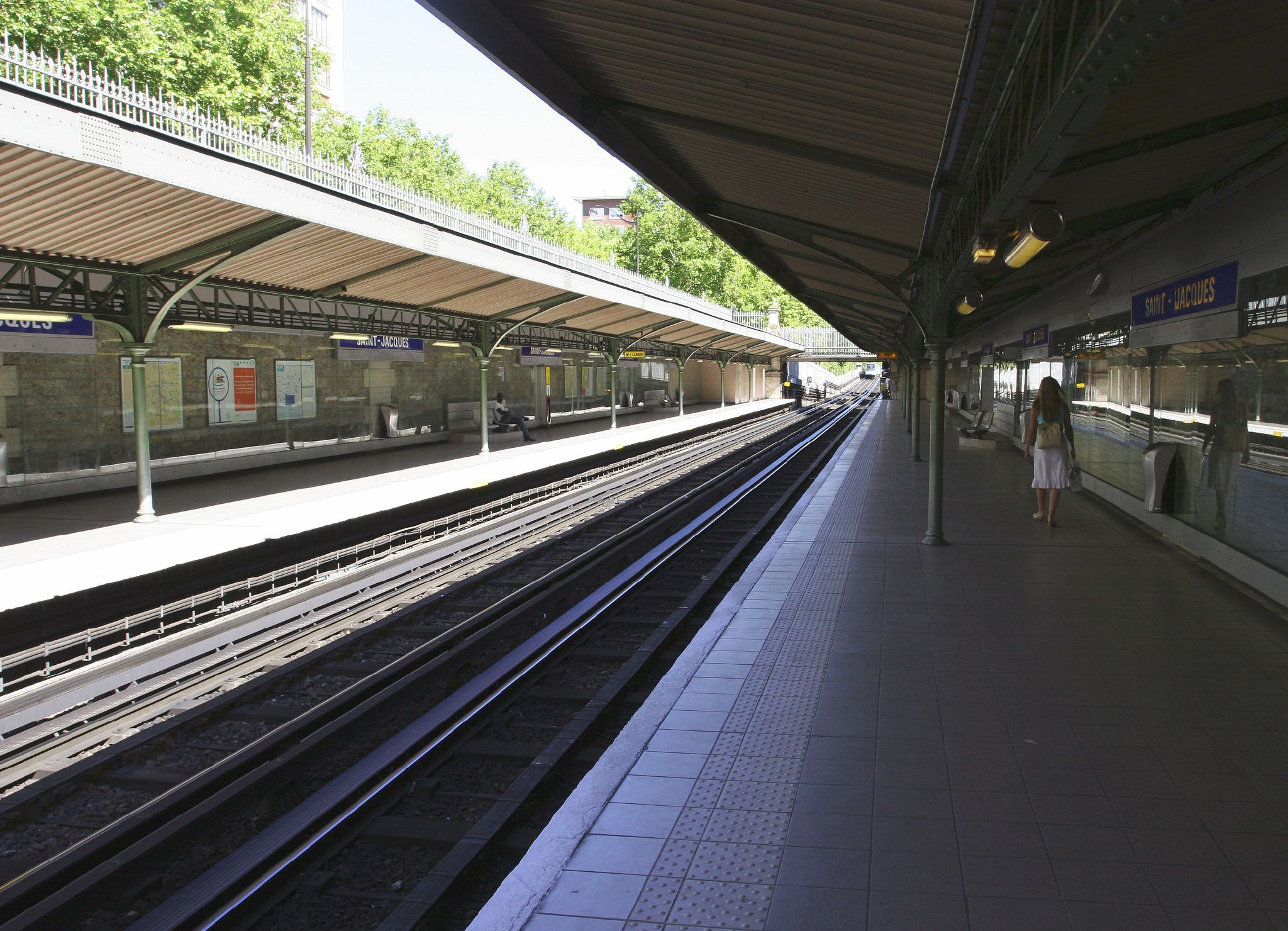 Metro Paris Ligne 6, station Saint-Jacques.